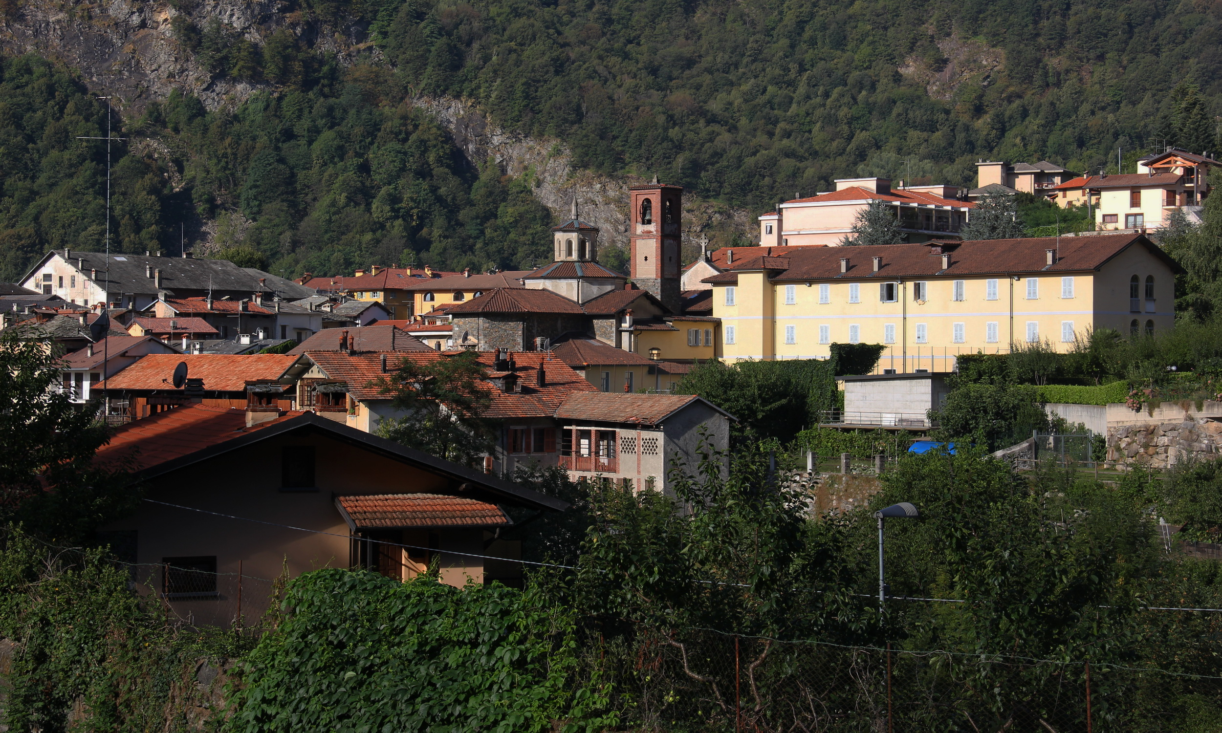 Varallo Sesia, Italy